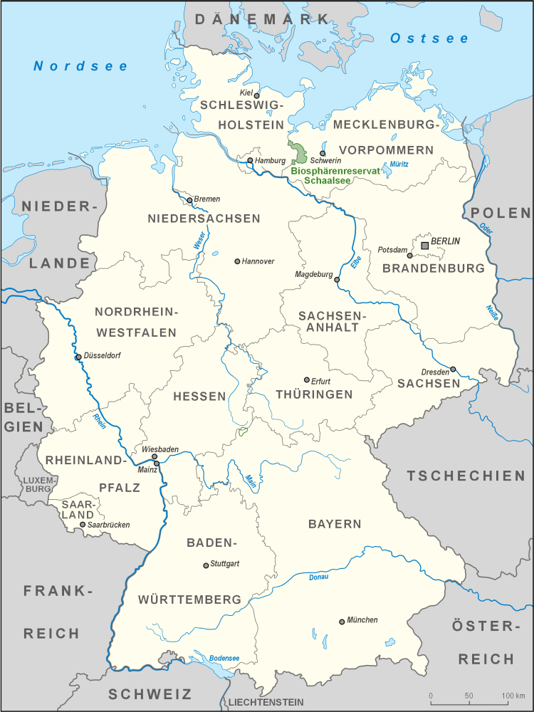 Karte des Biosphärenreservates Schaalsee in Deutschland